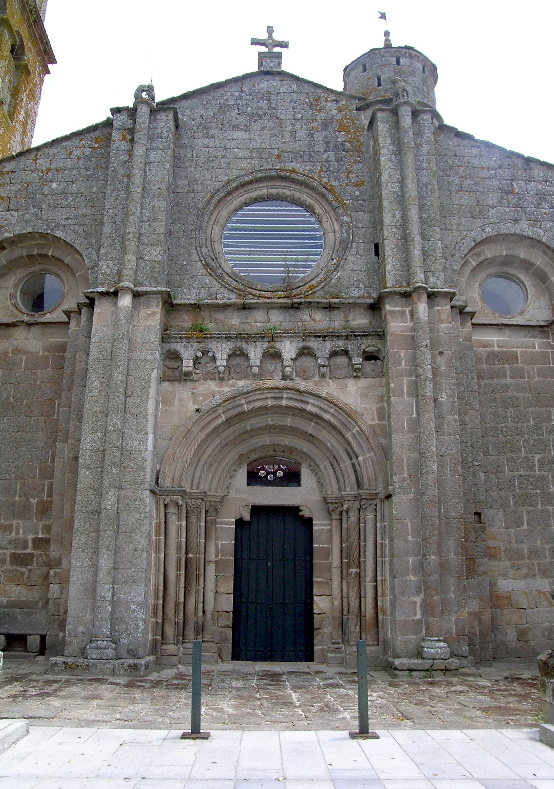 Fachada Occidental del Monasterio de Xunqueira de Ambía (Orense)